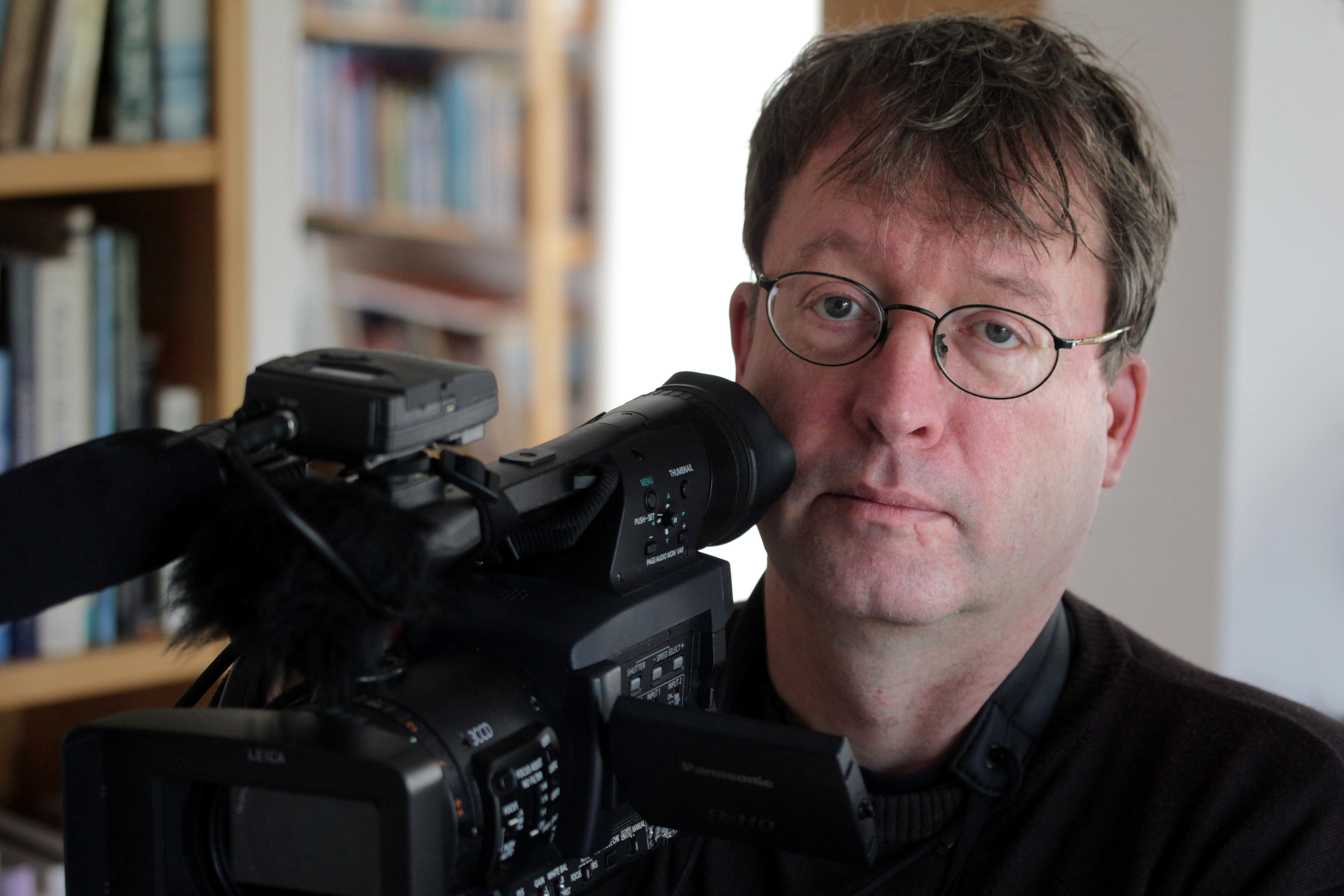 Bodo Witzke - ZDF Filmemacher 2012 bei den Dreharbeiten zu der 37Grad Sendung: "Du bist mein Ein und Alles". Pflege zwischen Liebe und Bankrott.